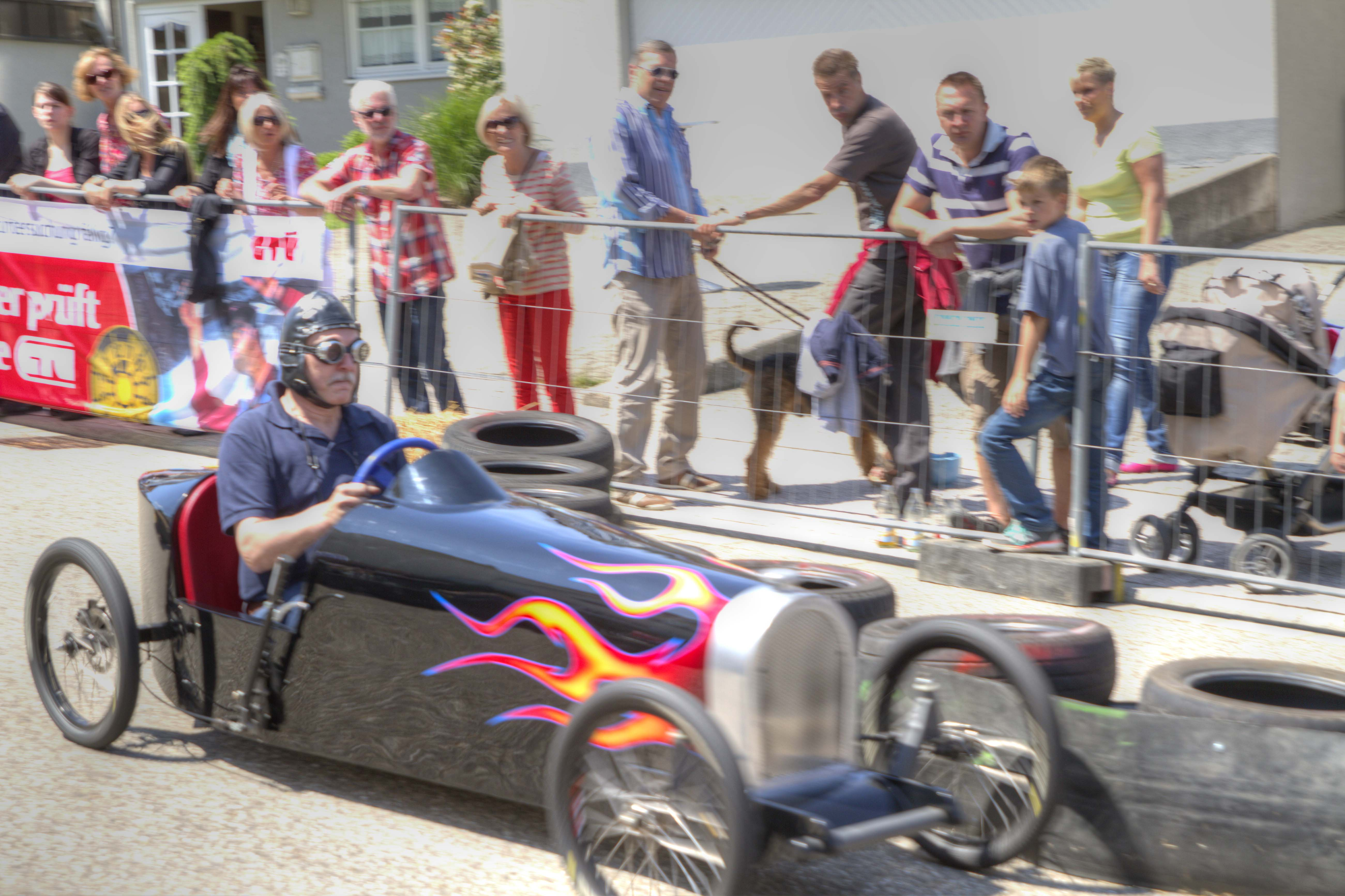 Eine Seifenkiste beim Völkersbacher Brunnenfest, einem Teilort von Malsch.